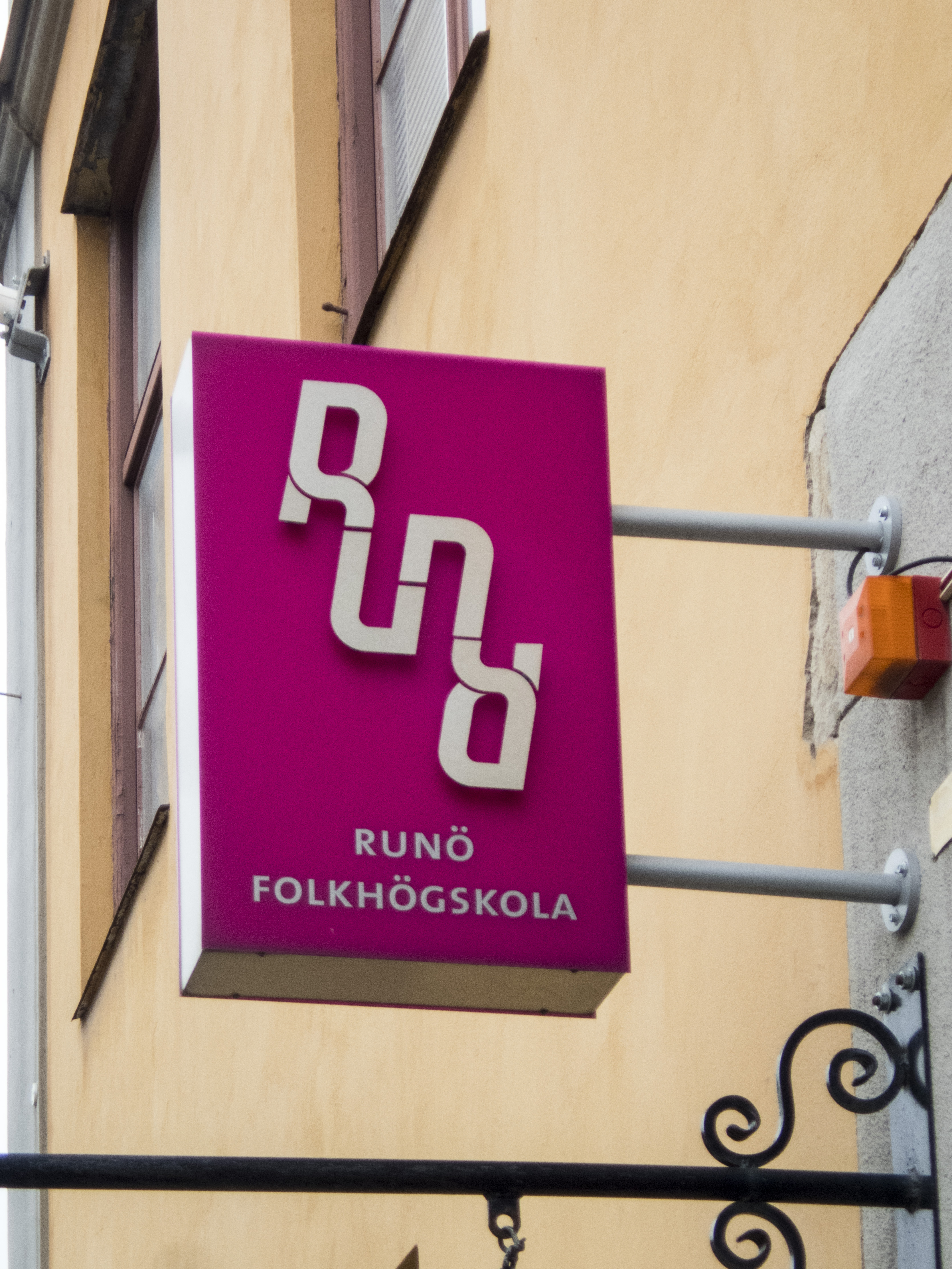 Runö folkhögskola, skylt. Hälsobrunnsgatan